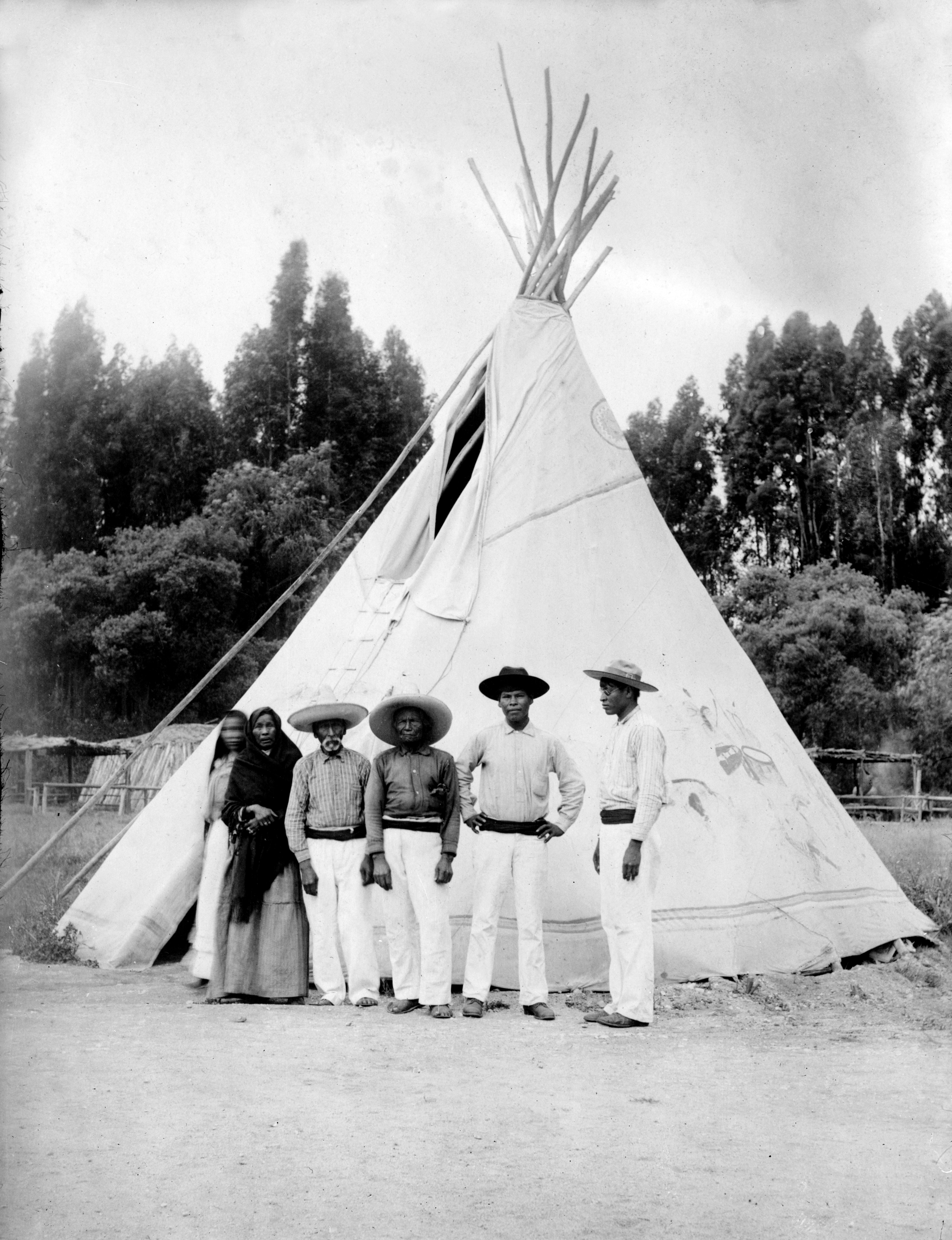 Yaqui indians